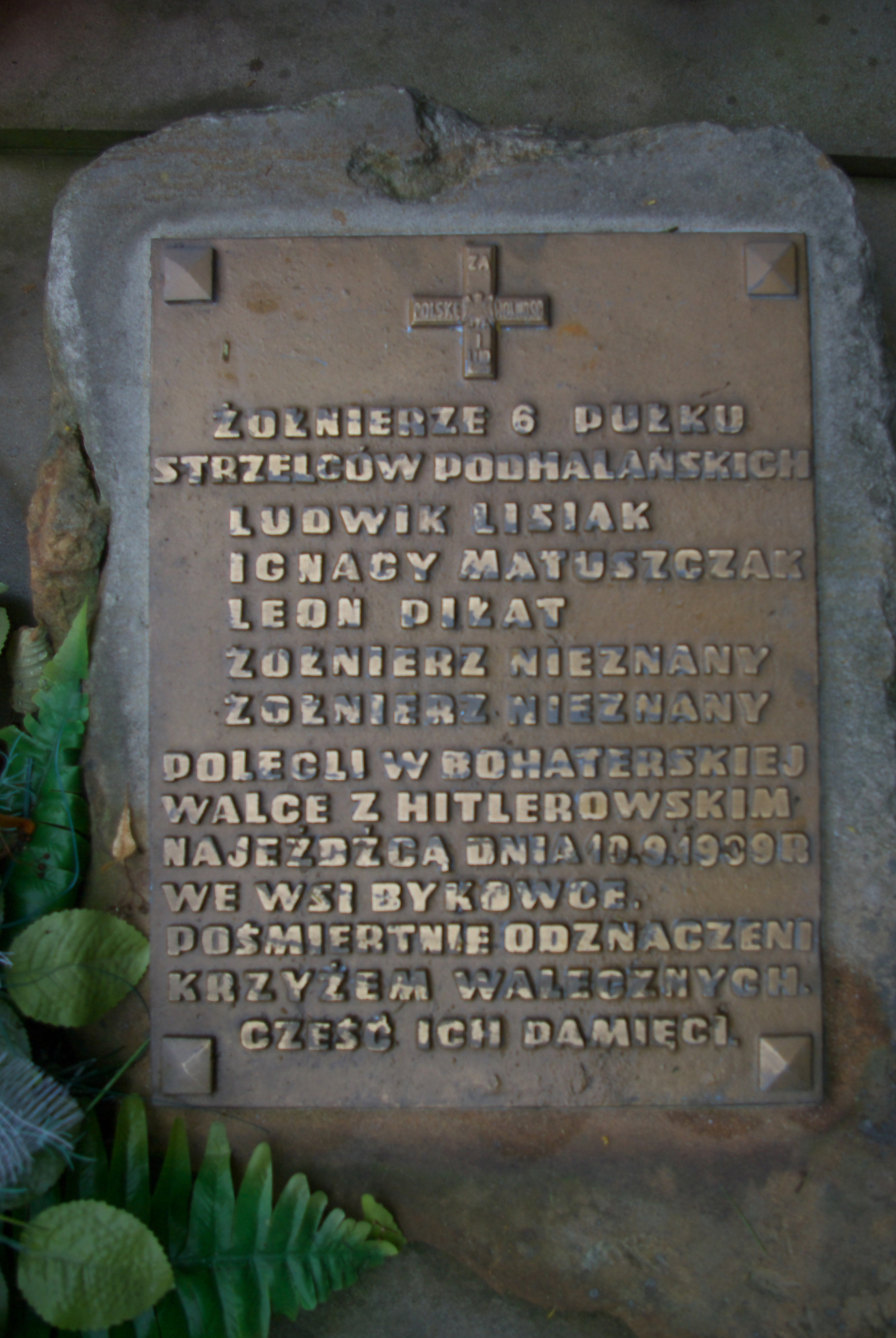 Grób żołnierzy 6 Pułku Strzelców Podhalańskich poległych 10 września 1939 na starym cmentarzu w Bykowcach